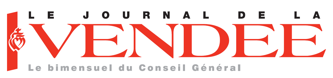 Logotype